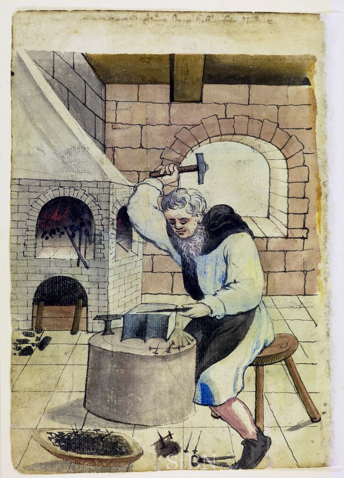 jorg (Jörg; Georg) koll (Koll) , Nagler (Nagler; Nagelschmied) Transkription und weitere Informationen